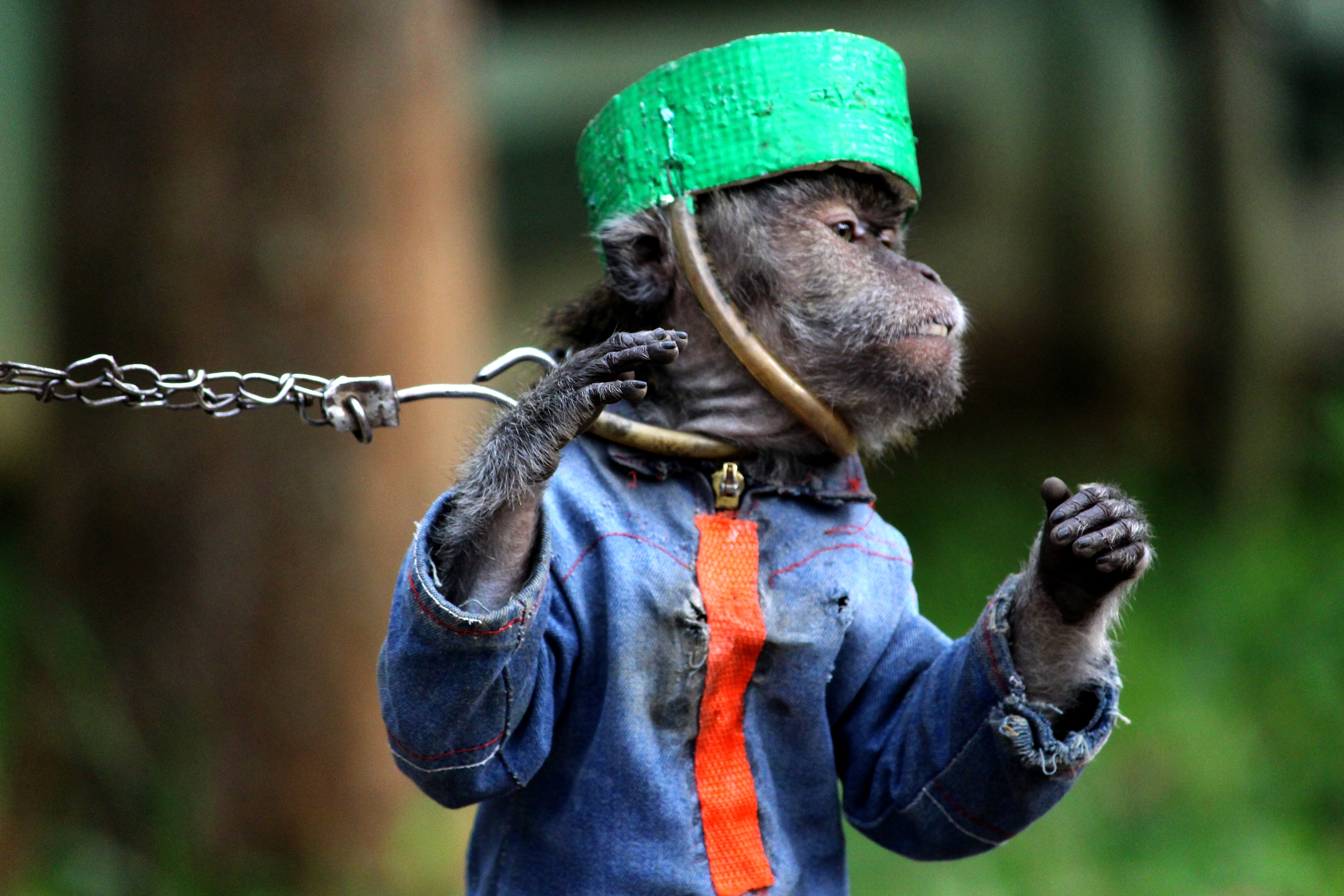 Wajah sedih monyet yang kerap dipergunakan dalam atraksi umum di Indonesia, topeng monyet atau ronggeng monyet seperti menyiratkan keinginannya untuk dibebaskan dari rantai yang senantiasa membelitnya. Foto diambil tahun 2017 di Jalan Sudirman Bogor